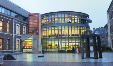 Photo de la médiathèque du centre-ville de Beauvais, après les travaux de 2012.